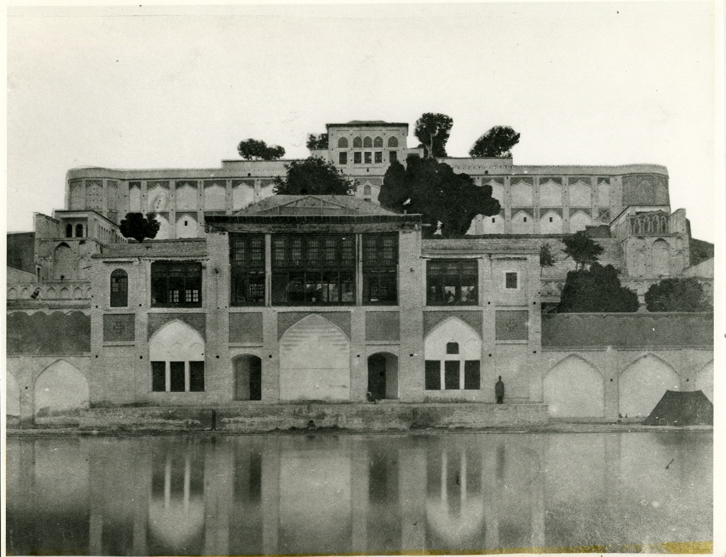 باغ موزه قصر